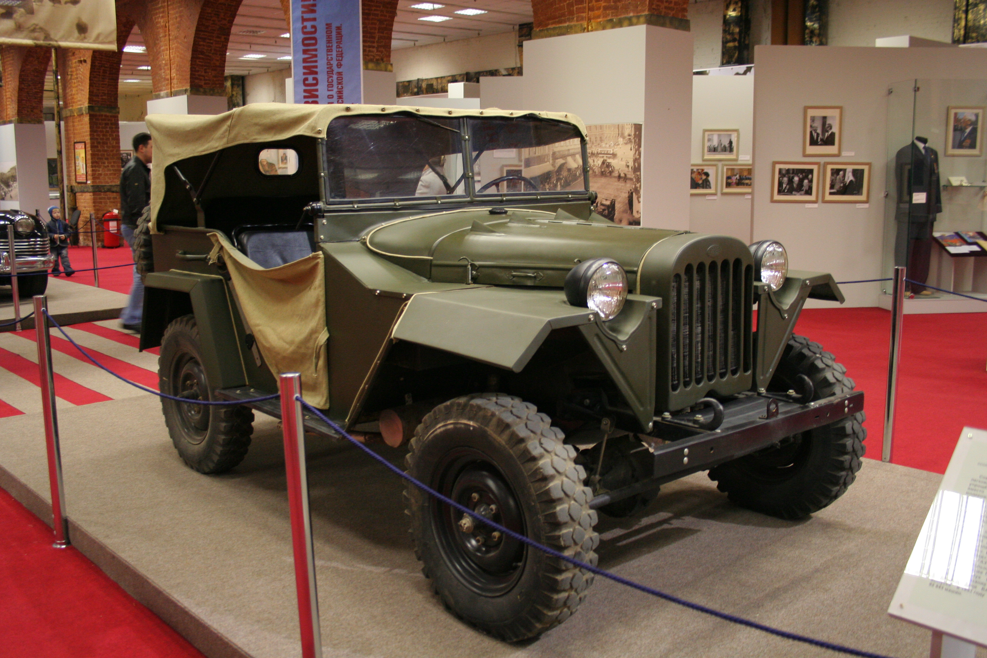 ГАЗ-67 в Музее Москвы в бывших Провиантских складах.